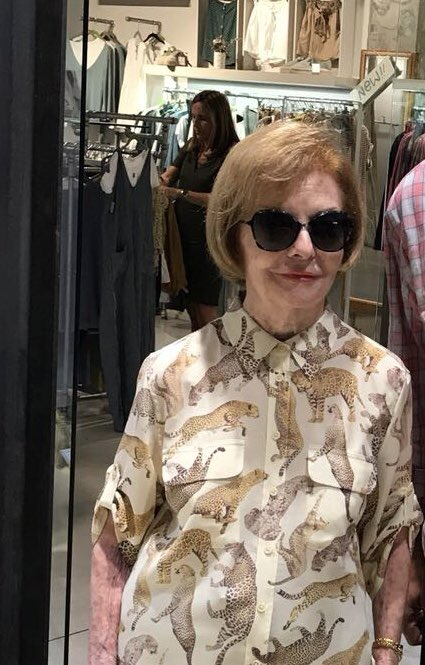 Isabel Peron en 2018